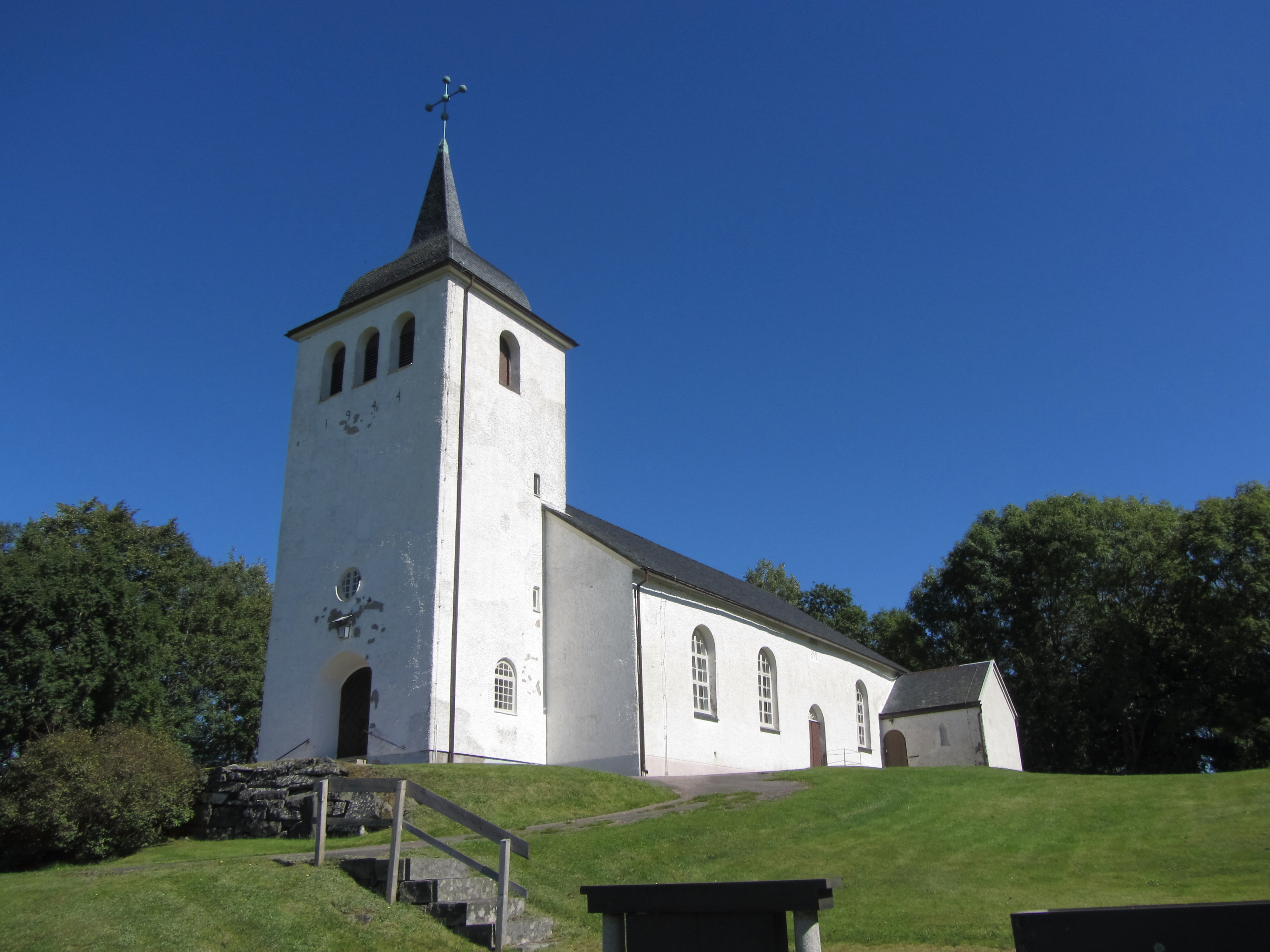 Rännelanda kyrka i Dalsland.